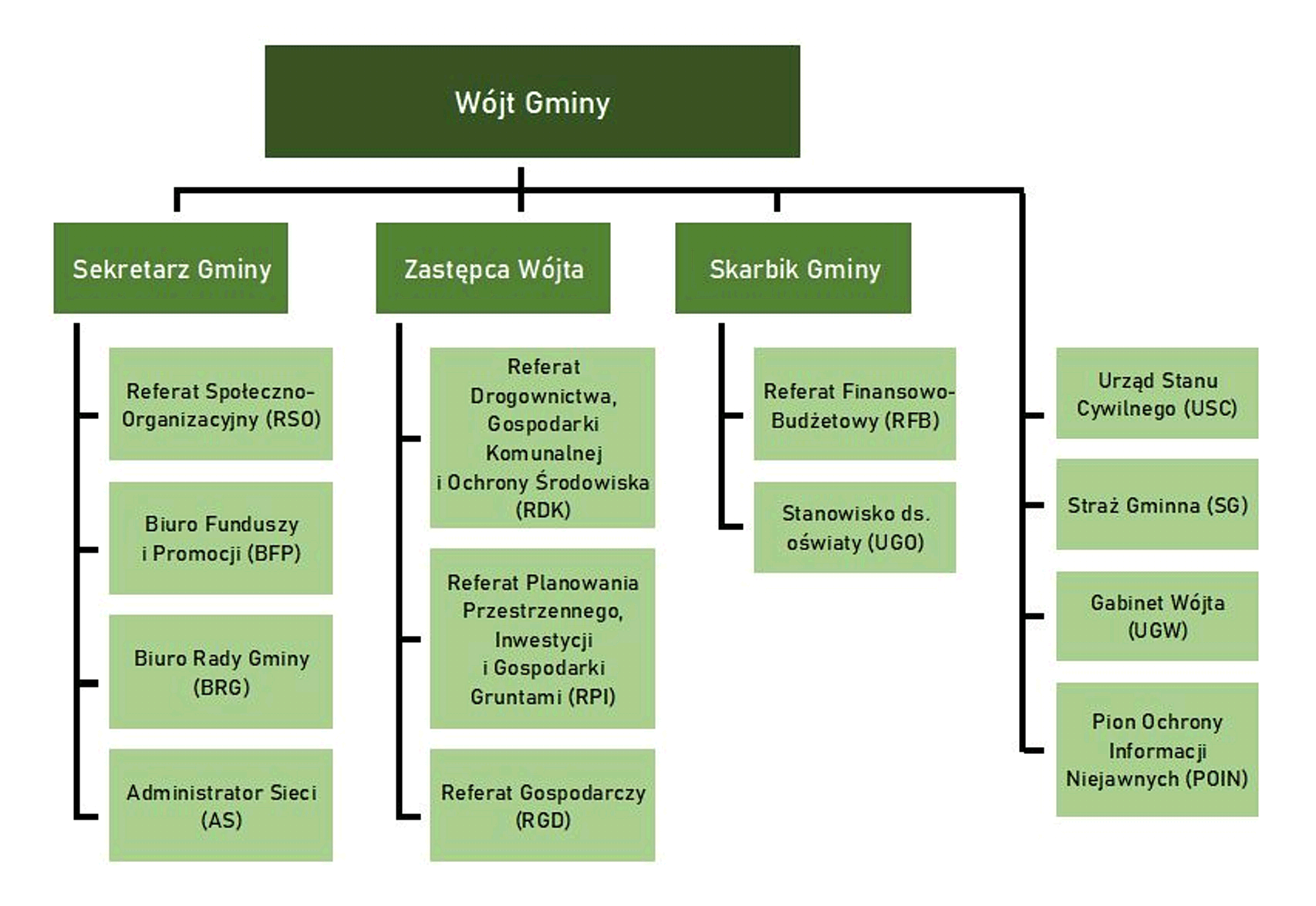 Schemat organizacyjny Urzędu Gminy w Kłodawie (2020r.)